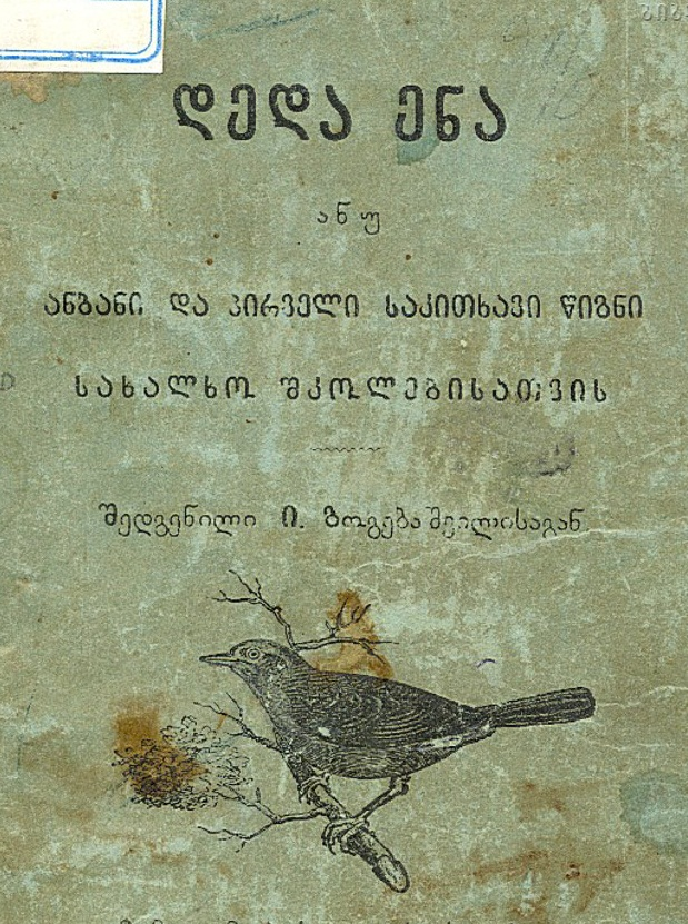 1876 წელს გამოცემული „დედა ენის“ ყდა.